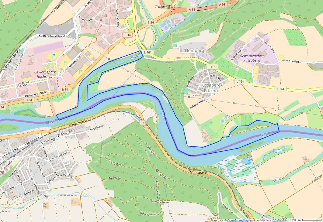 Naturschutzgebiet Kadelburger Lauffen-Wutachmündung